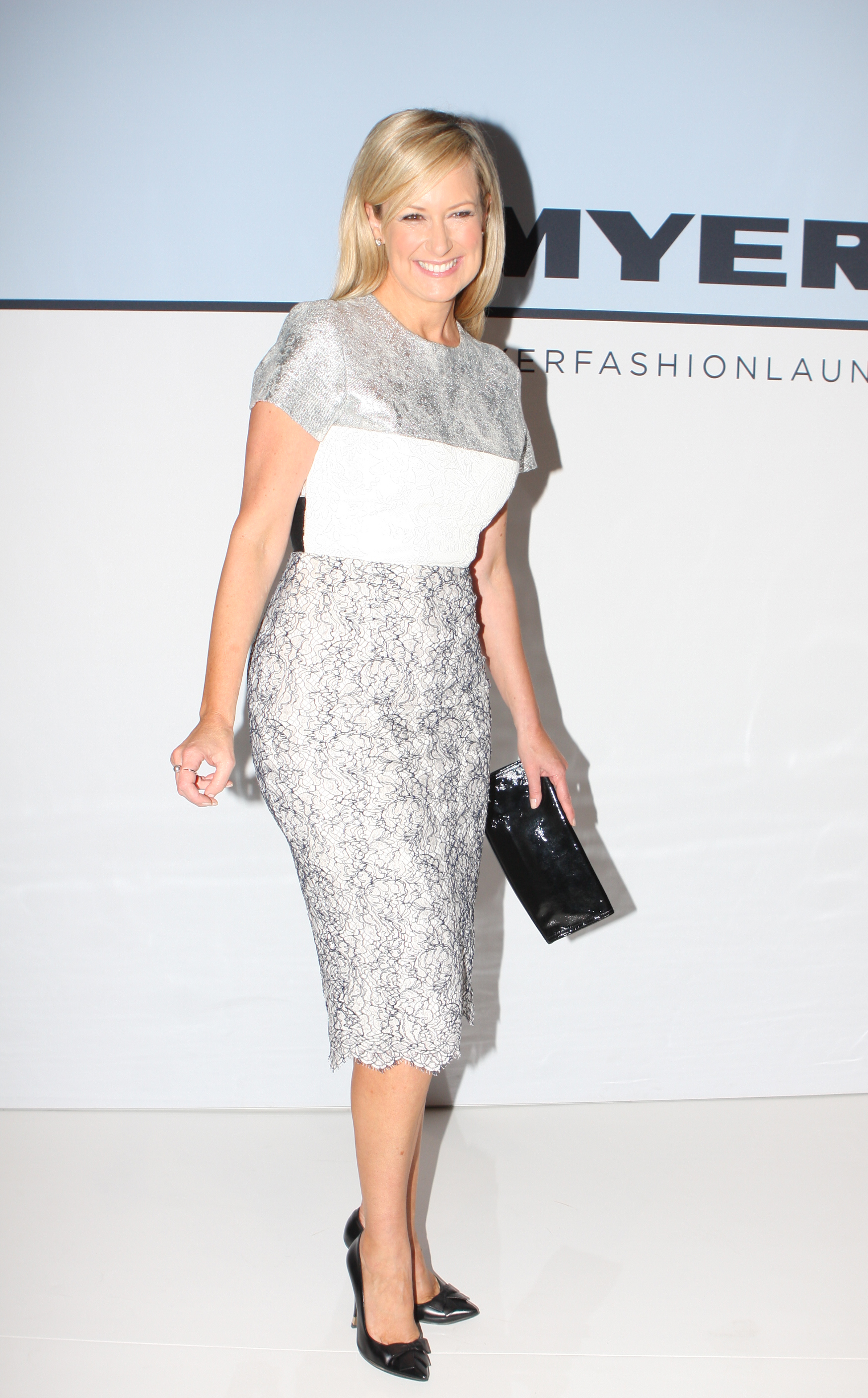 Melissa Doyle